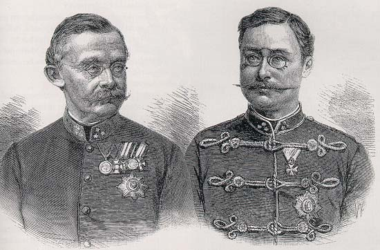 Adolf en Willem IV groothertogen van Luxemburg